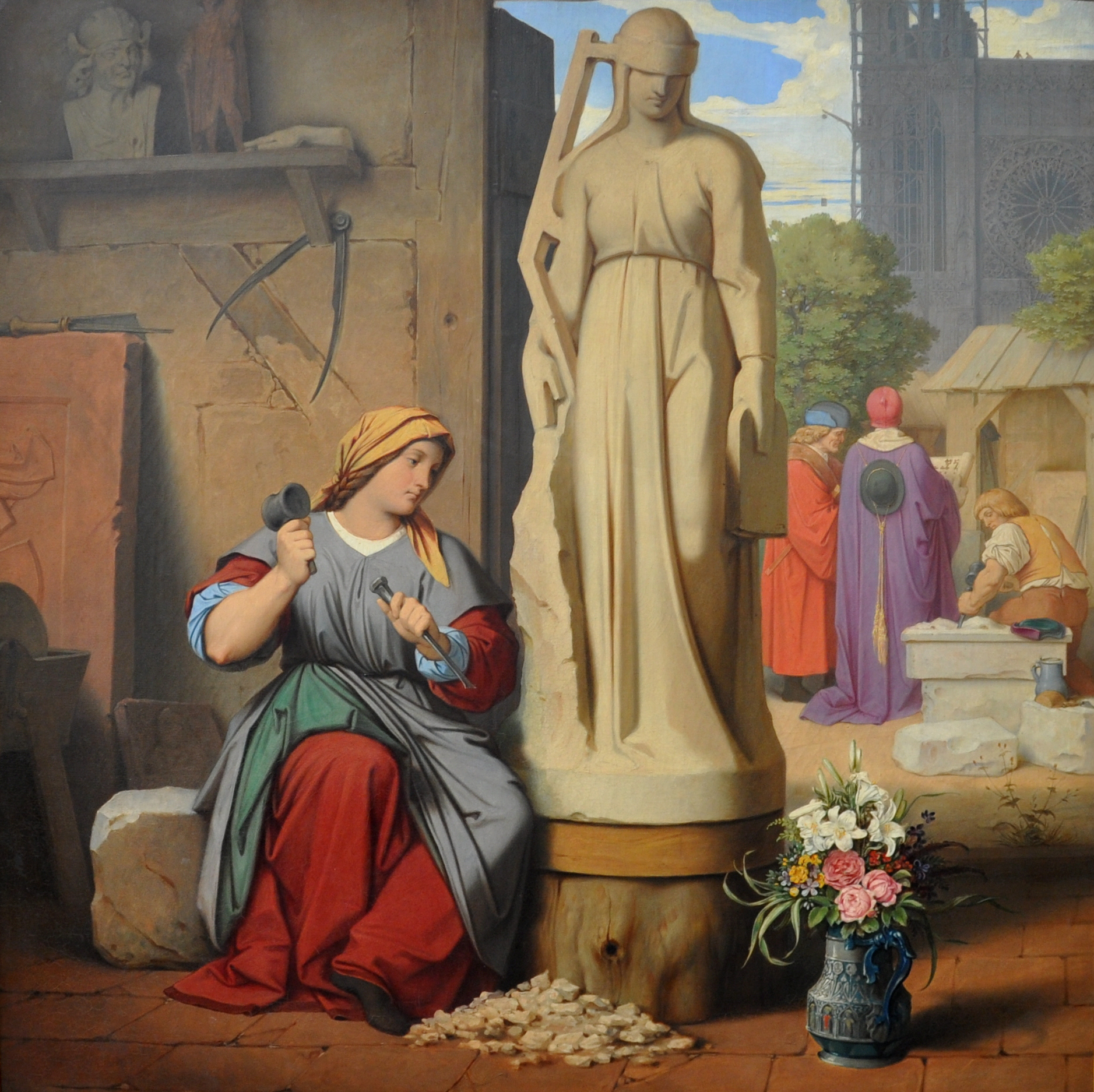 Sabina von Steinbach an der Figur der "Synagoge" für das Straßburger Münster arbeitend